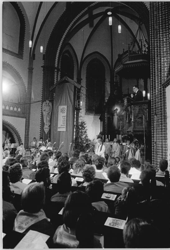 ADN-ZB Schindler 24.6.87 Berlin: Jubiläum. Kirchentag- Der "Evangelische Kirchentag Berlin 87" wurde eröffnet. Er ist Höhepunkt zahlreicher Veranstaltungen der Evangelischen Kirche in Berlin-Brandenburg zur 750-Jahr-Feier der Stadt. In der Erlöserkirche in Berlin-Lichtenberg hielt Generalsuperintendant Dr. Günter Krusche die Predigt.